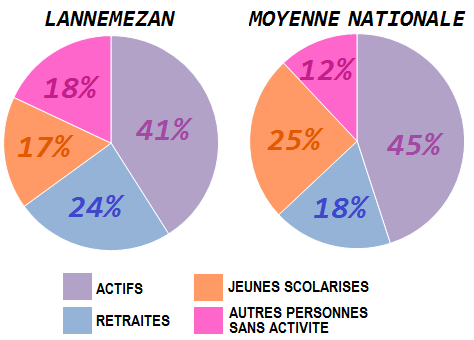 Statistiques de l'emploi Lannemezan